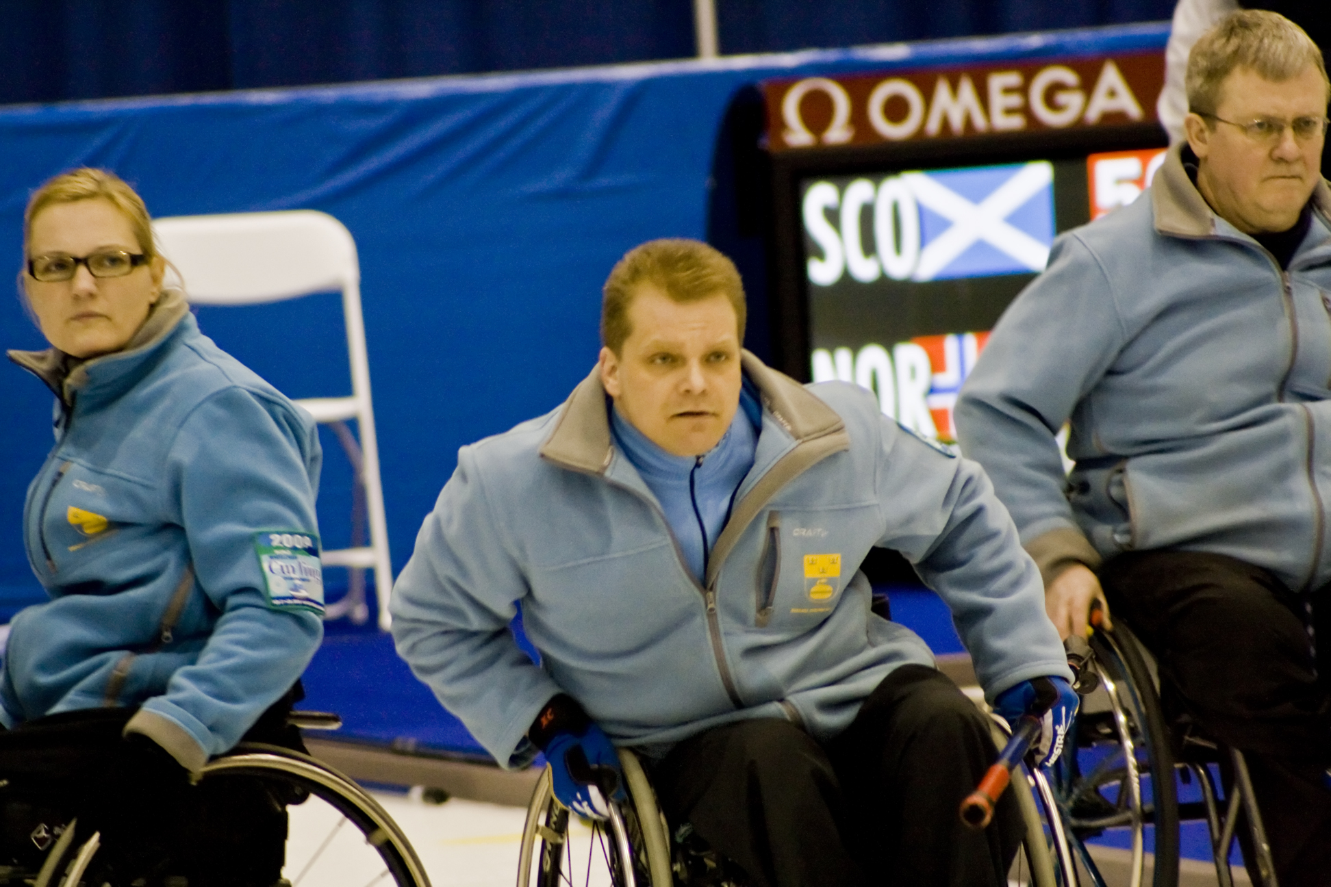 Team Sweden (l to r): Anette Wilhelm, Patrik Burman and Glenn Ikonen